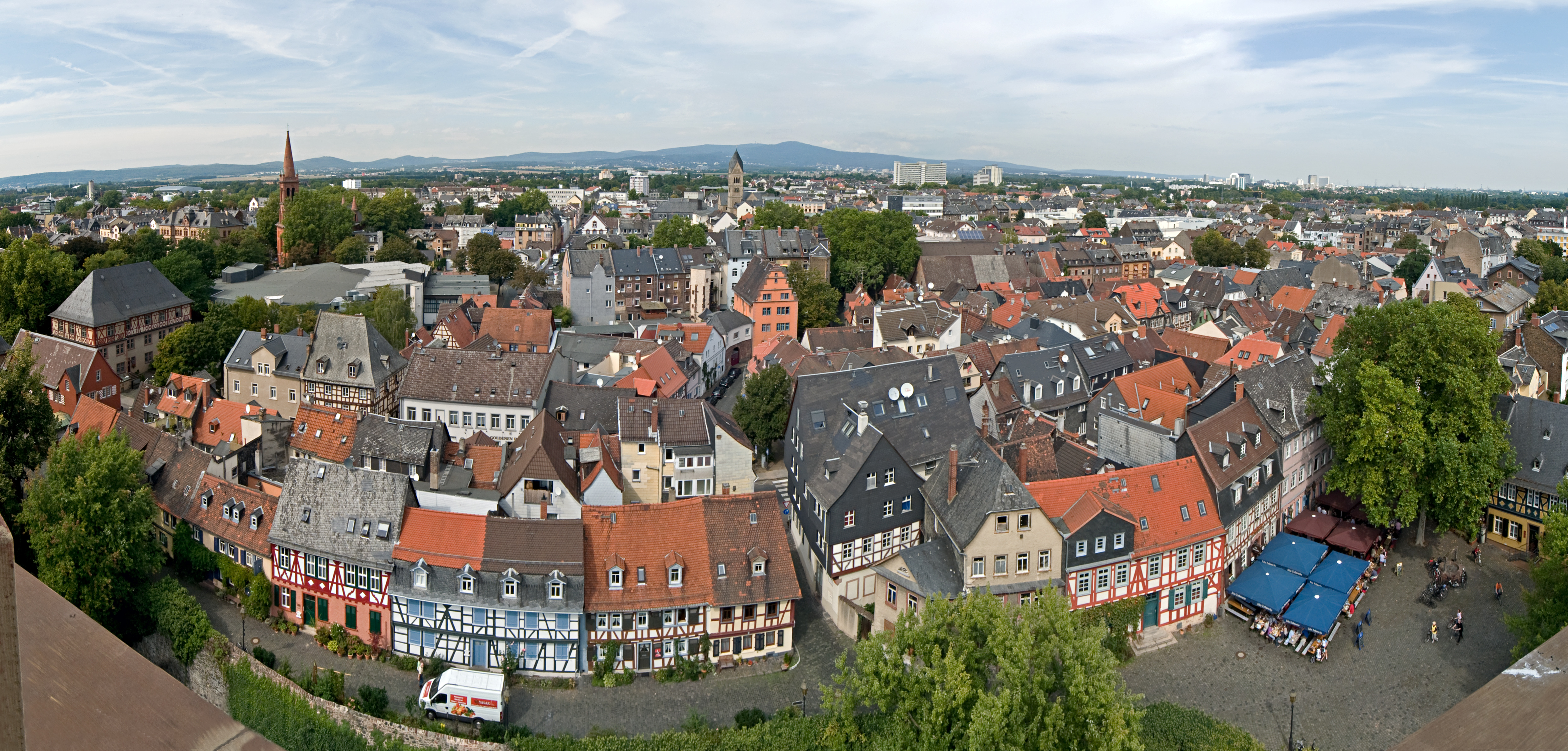 Panoramablick vom Höchster Schloßturm auf die Höchster Altstadt